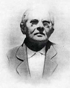 Pia Maria Nalli (Palermo, 10 febbraio 1886 – Catania, 27 settembre 1964)